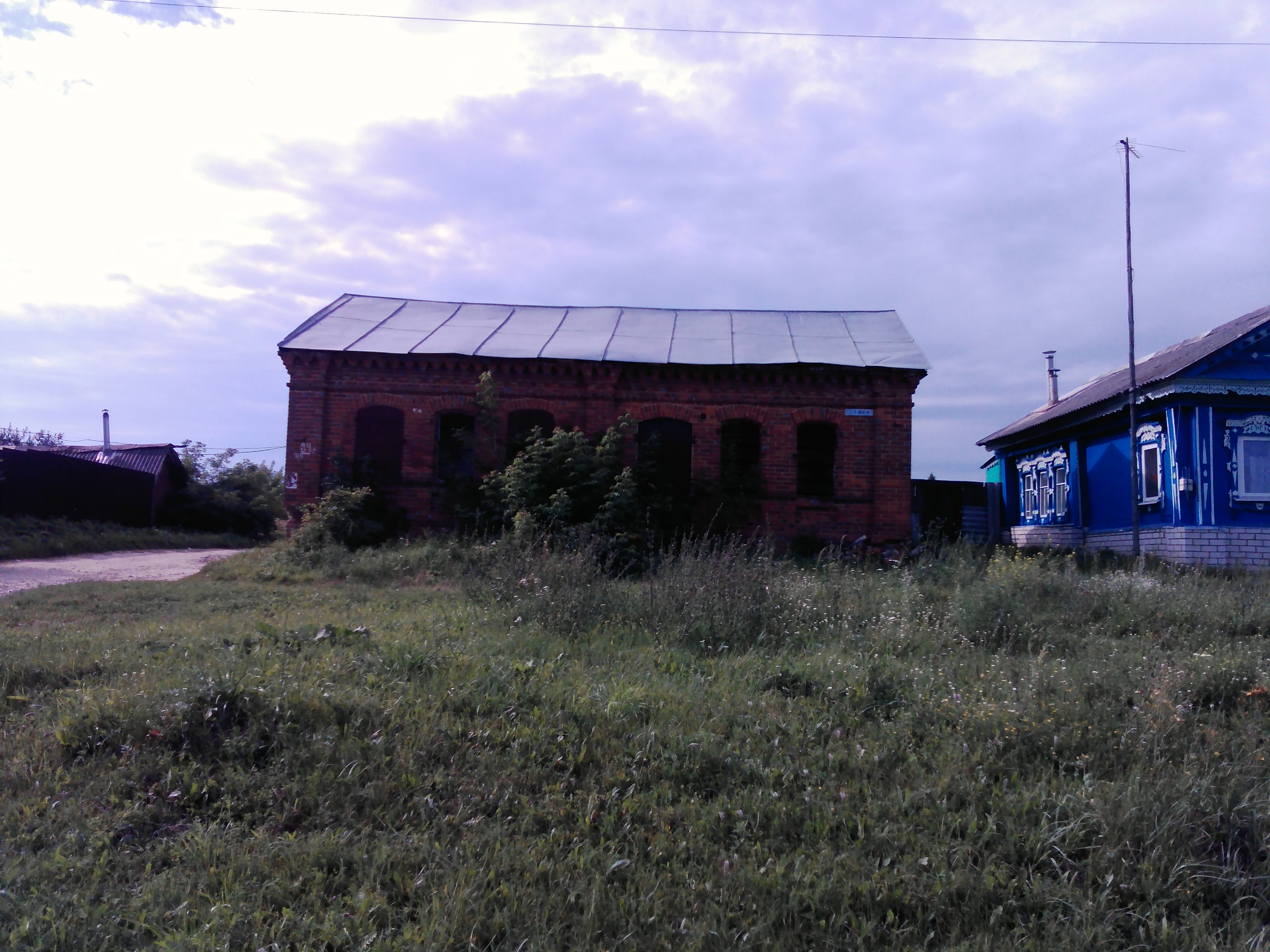 ул. 1 мая, д.54А. Бывшая приходская школа